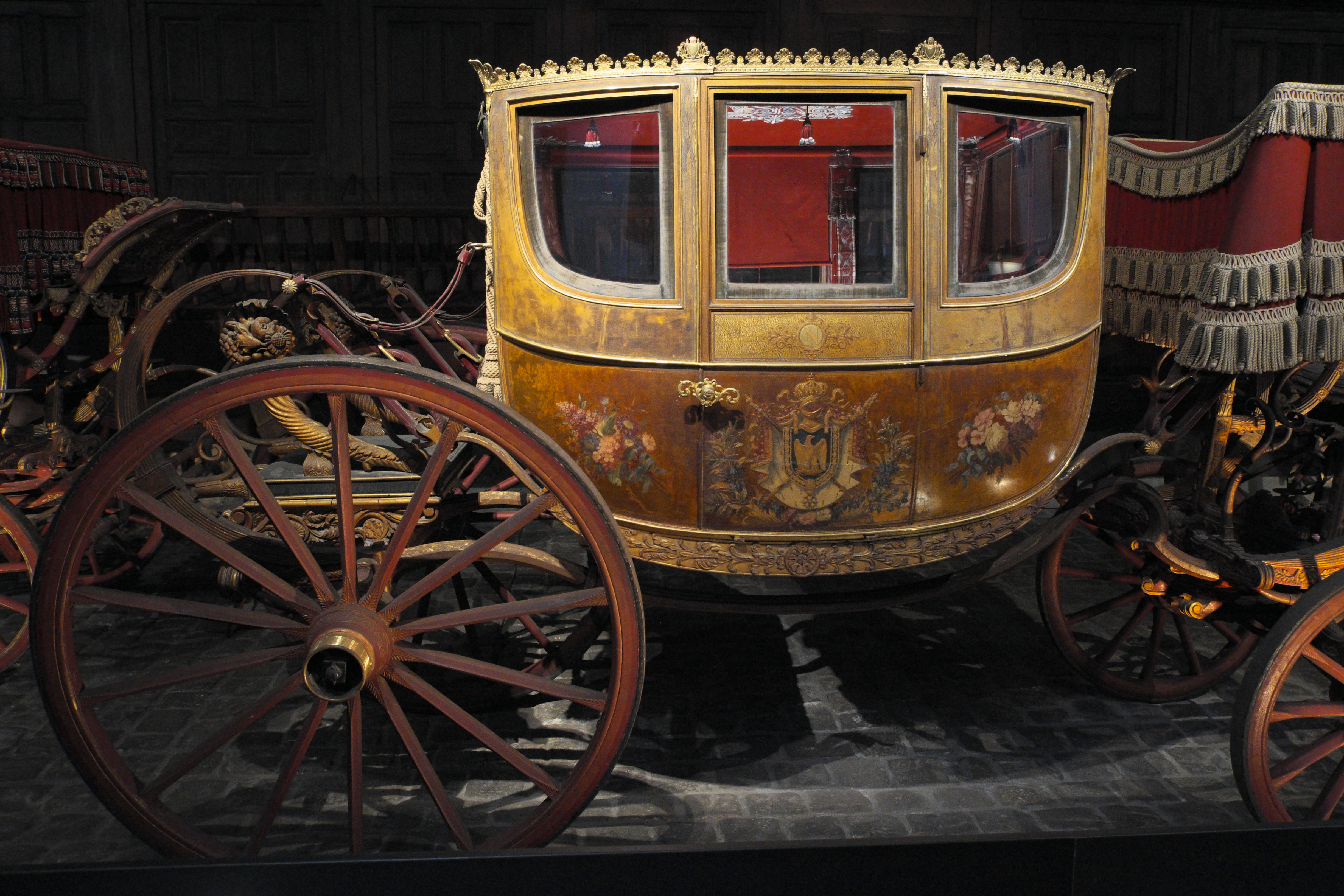 Kutschenmuseum, Galerie des Carosses, in der Grande Écurie des Schlosses von Versailles im Département Yvelines (Region Île-de-France/Frankreich)